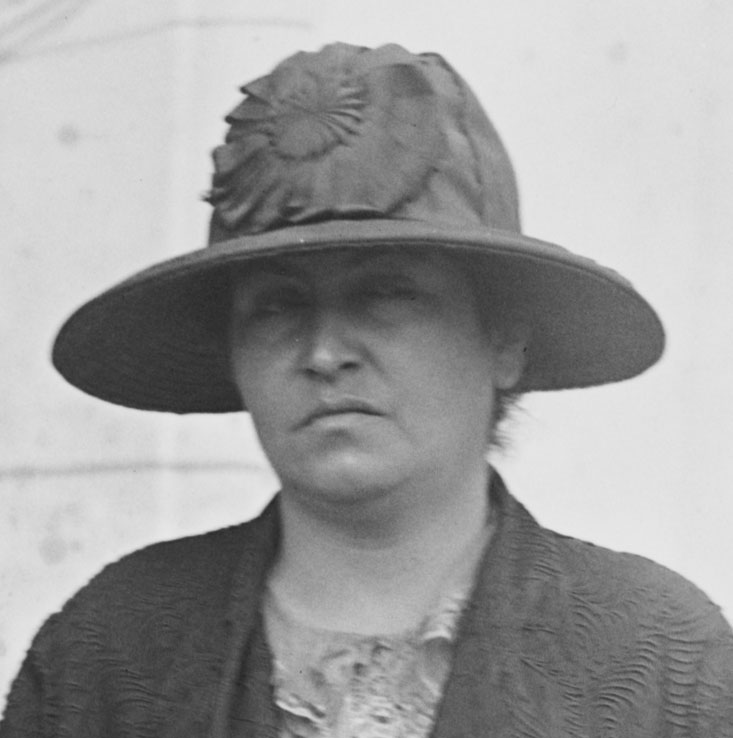 Lucila de María del Perpetuo Socorro Godoy Alcayaga, llamada Gabriela Mistral(al parecer por su admiración hacia Gabriele d’Annunzio y Frédéric Mistral) (Vicuña, 7 de abril de 1889 - † Nueva York, 10 de enero de 1957), fue una destacada poetisa, diplomática y pedagoga chilena, que bajo el seudónimo de Gabriela Mistral se destacó de forma especial en la literatura.